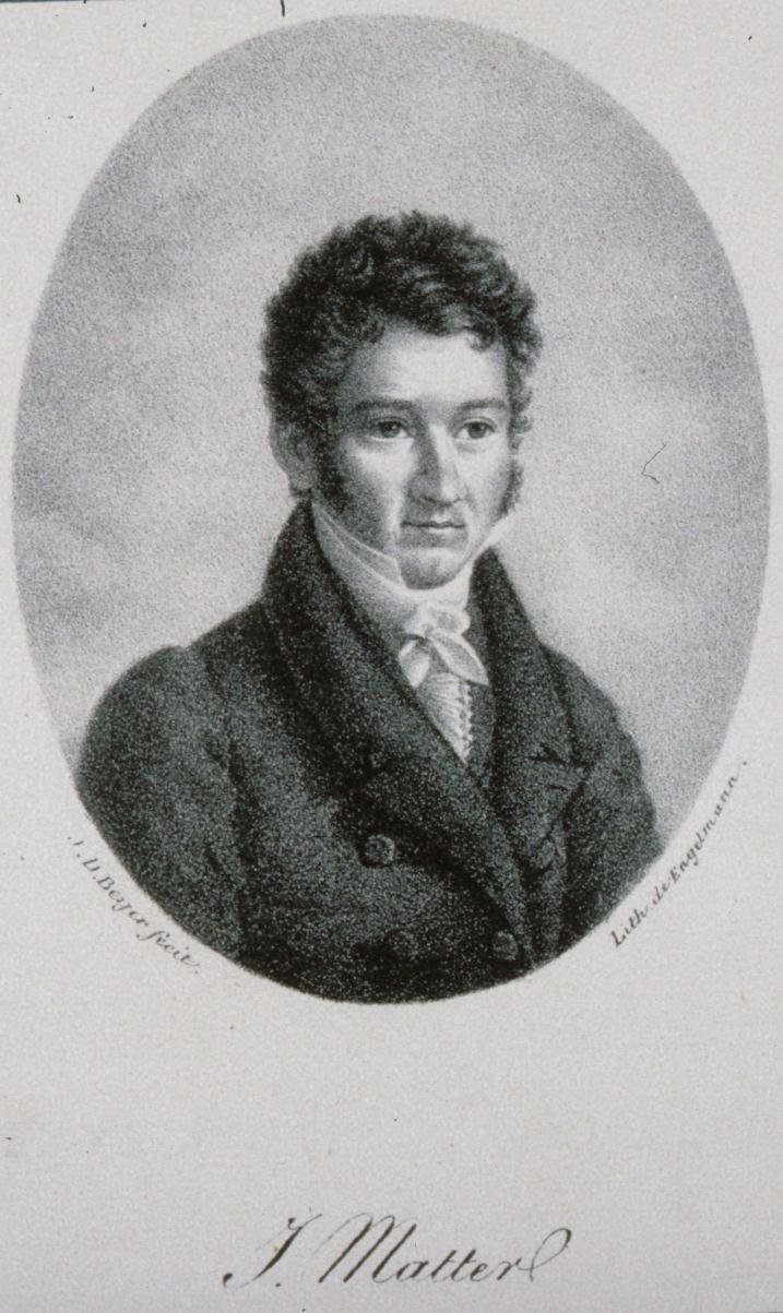 Lithographie de Jacques Matter par Beyer et Engelmann - coll. BNUS